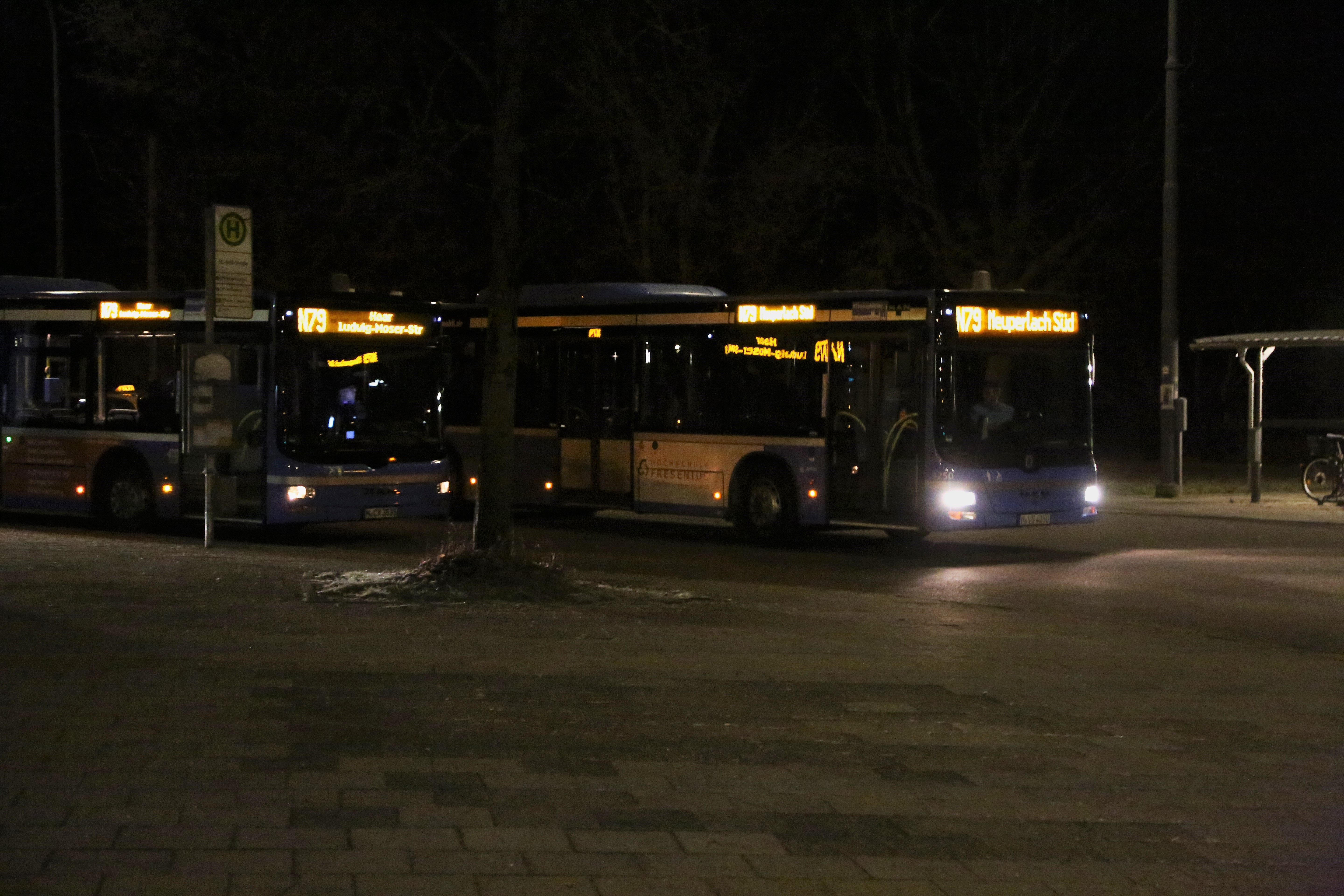 Nachtbusse N79 in beiden Richtungen treffen sich an der Haltestelle St.-Veit-Str.